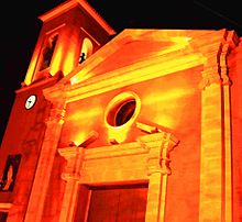 Iglesia de Nuestra Señora de la Salceda. Siglo XVIII.